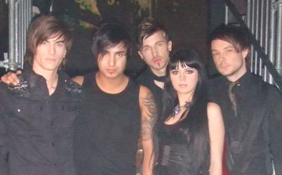 Eisblume